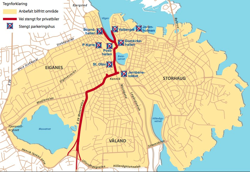 Kart over stengte veier for bilfri søndag i Stavanger 2011